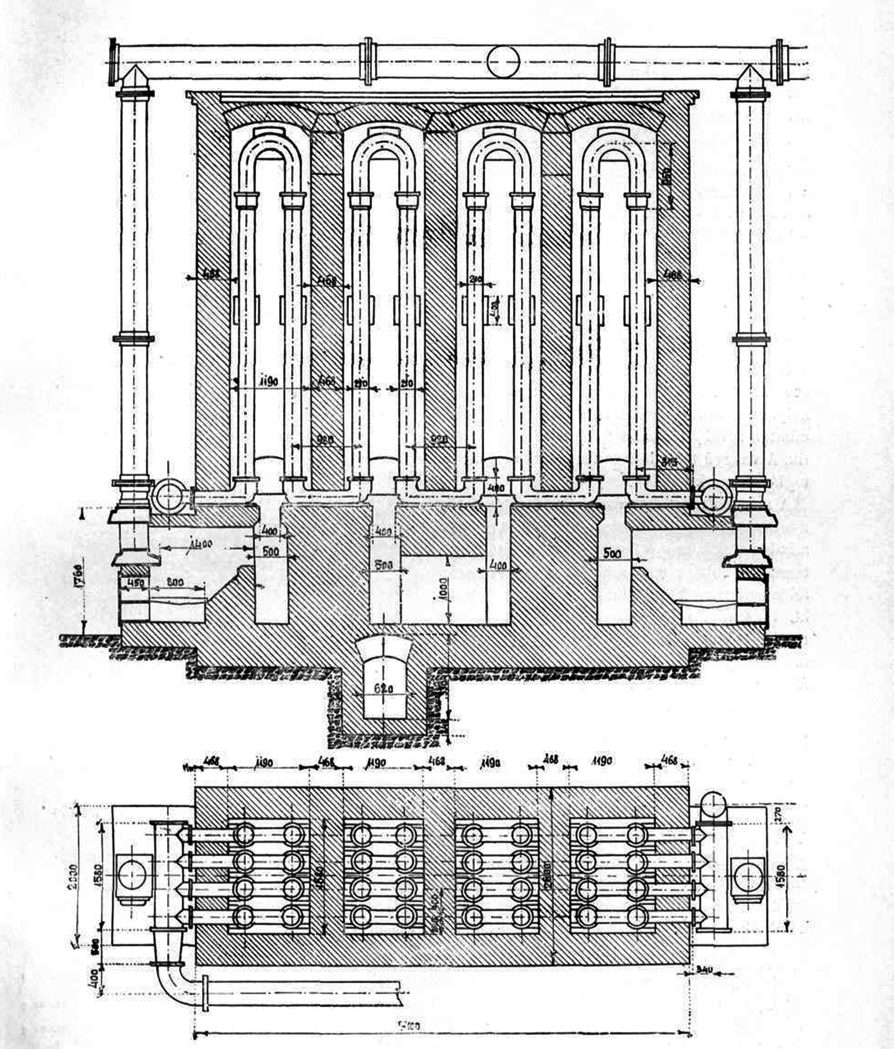 A Govasdiai Wasseralfingen-féle léghevltö tervrajza. (fütőfelülete 134 lap méter).